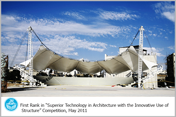 سازه های چادری پارک آب و آتش تهران - شرکت سازه های پارچه ای دیبا